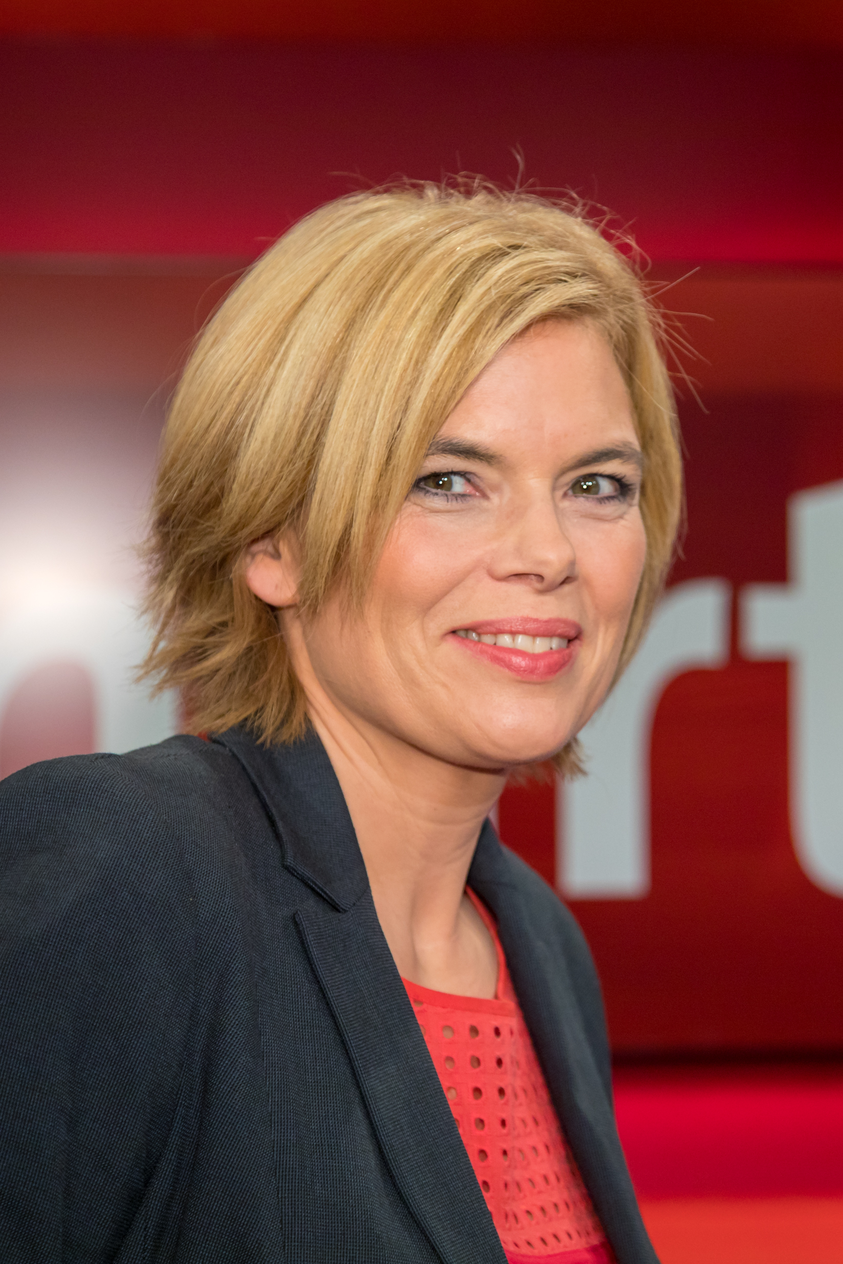 Julia Klöckner in der WDR-Sendung "hart aber fair" am 18.12.2017